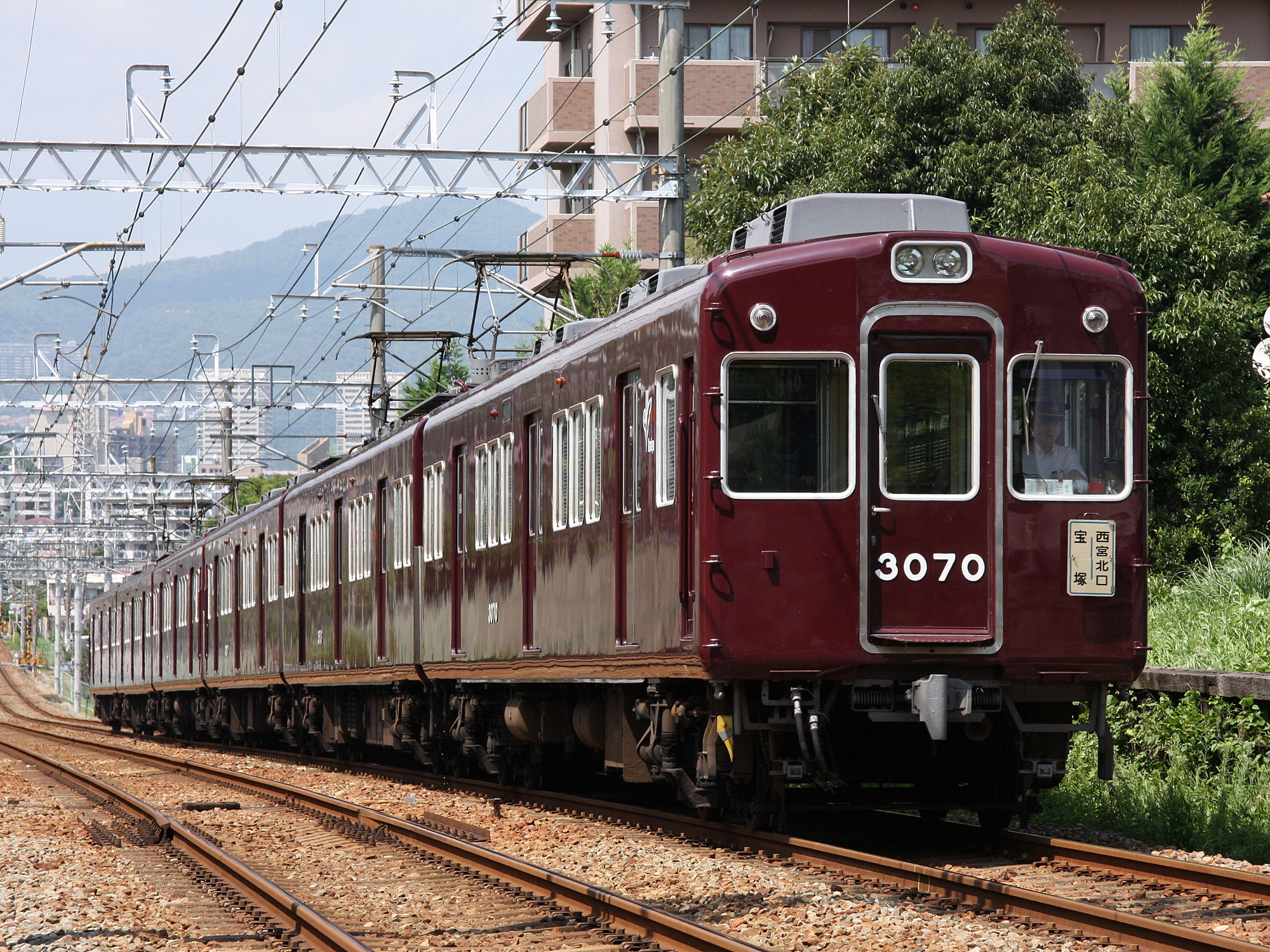 阪急3000系（冷房改造済・行先表示幕未設置） 小林-仁川間